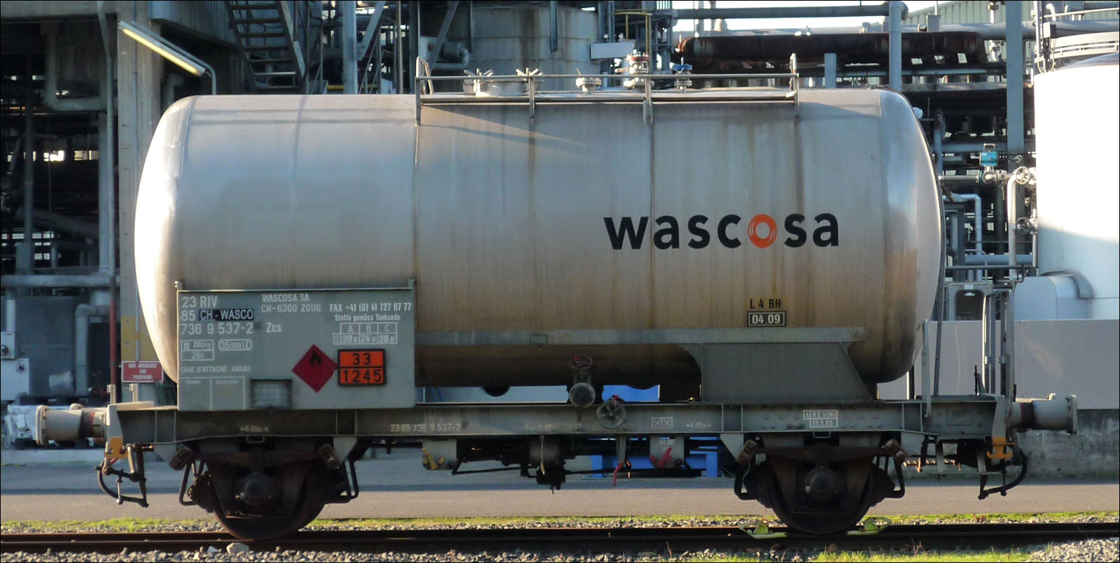 Kesselwagen der Wascosa. Die Gefahrstoffkennzeichnung 1245 steht für Methylisobutylketon.